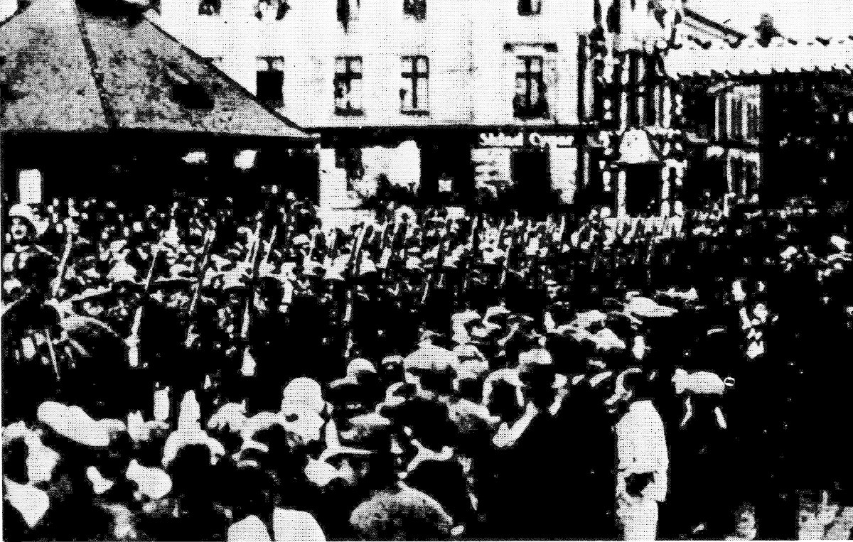 Wkroczenie wojsk polskich do Lipin (dziś dzielnica Świętochłowic) po podziale Górnego Śląska